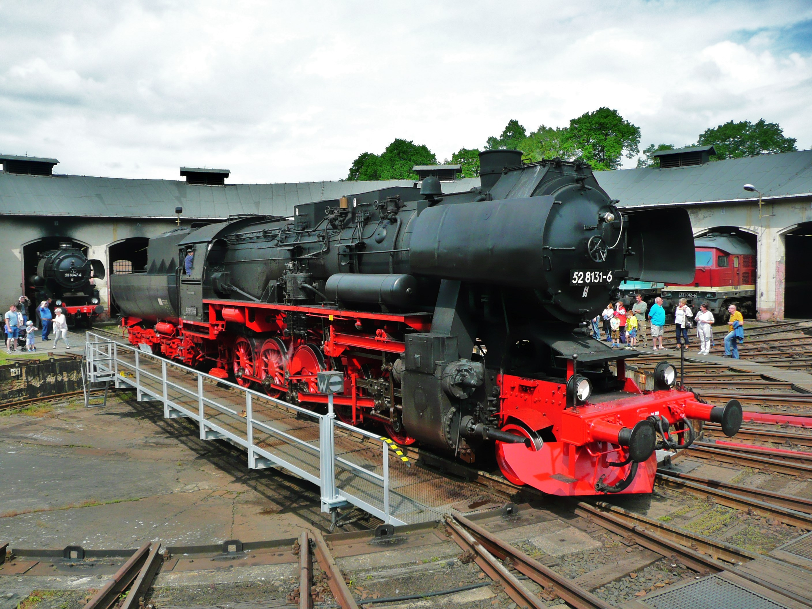 52 8131 beim Tag der offenen Tür im Bahnbetriebswerk Nossen.